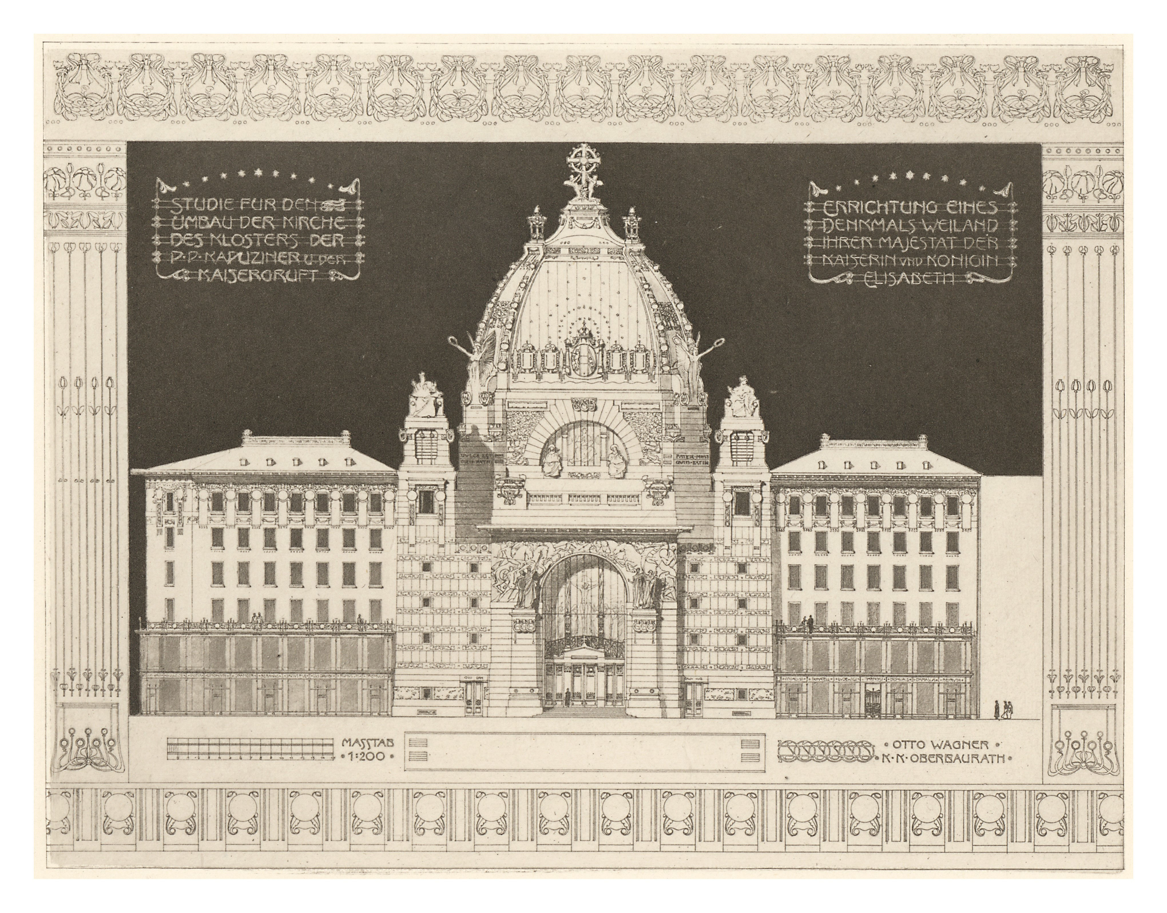 Studie für den Umbau der Kapuzinerkirche und der Kapuzinergruft Bd. III 2. Heft Imperial Crypt Native nameKaisergruftKapuzinergruftLocationCapuchin Church, Innere Stadt, ViennaCoordinates48° 12′ 20″ N, 16° 22′ 11″ E Authority control : Q662652 VIAF: 240450117 GND: 4272994-4 Concept, not realized